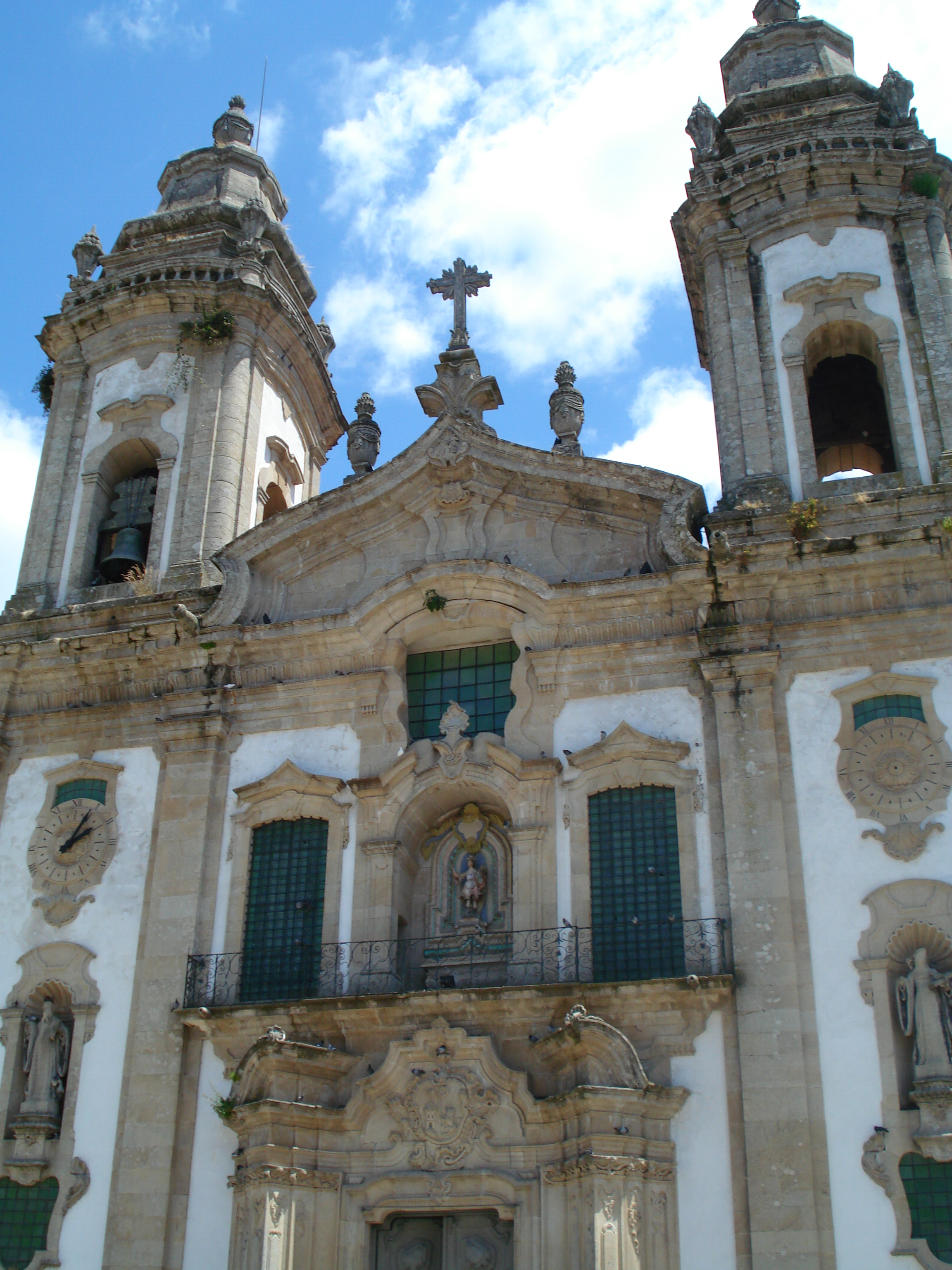 O Mosteiro de São Miguel de Refojos de Basto, fica situado na freguesia de Refojos, em Cabeceiras de Basto, Portugal.